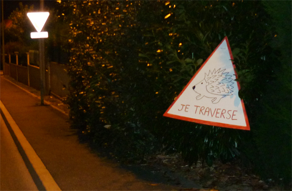 Panneau incitant à la limitation de vitesse pour permettre aux hérissons de traverser les routes en ville sans se faire écraser.